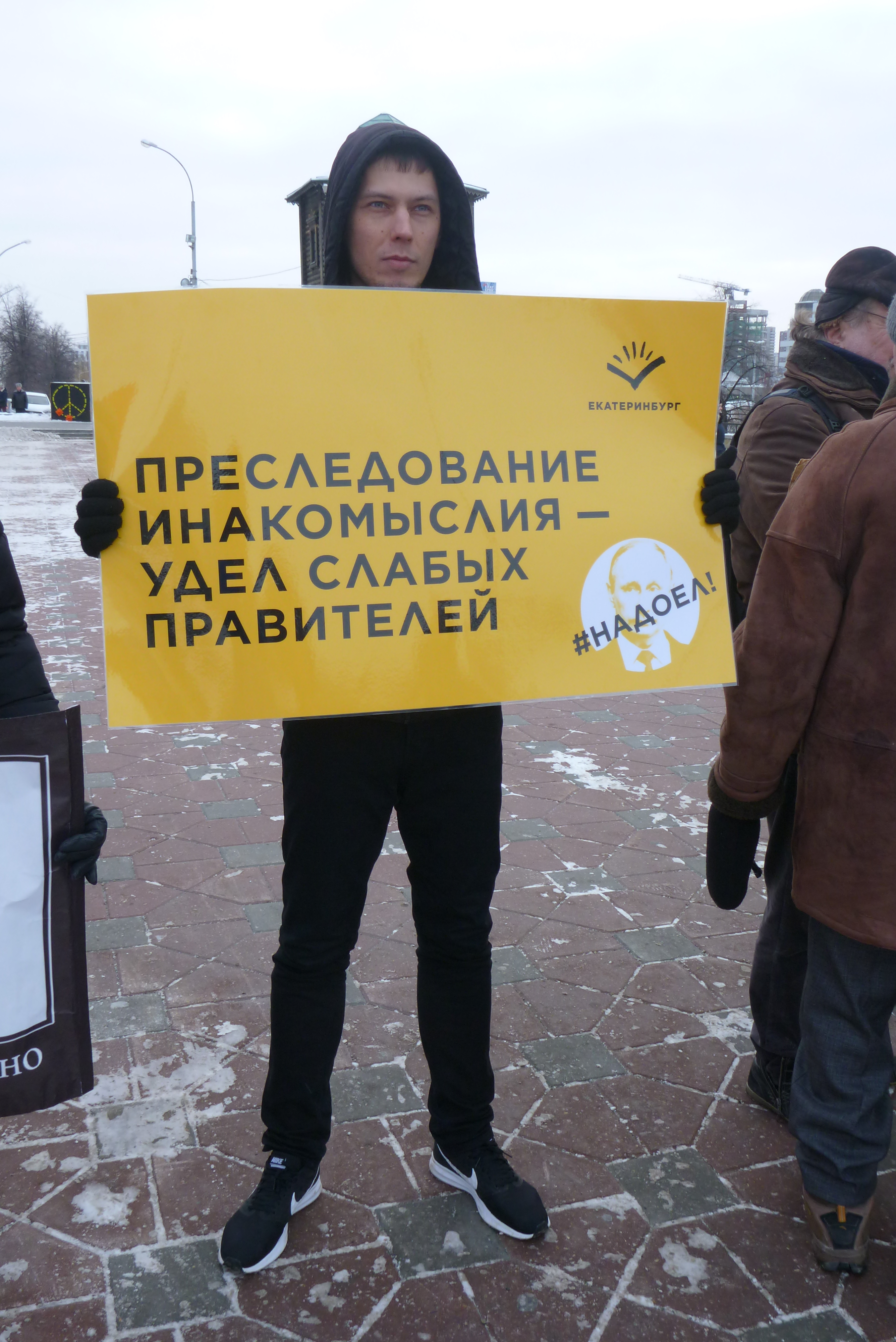 Координатор Открытой России на пикете в Екатеринбурге. 6 января 2019 года